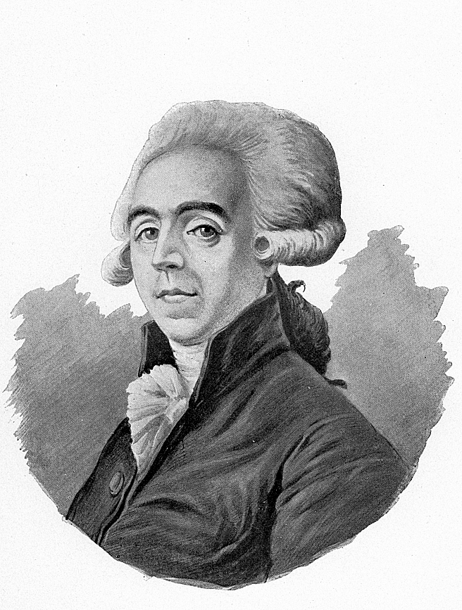 Jean-Louis Baudelocque